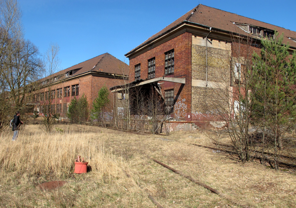 Heeresbekleidungsamt Bernau, Nebenlager, erbaut 1939-1942